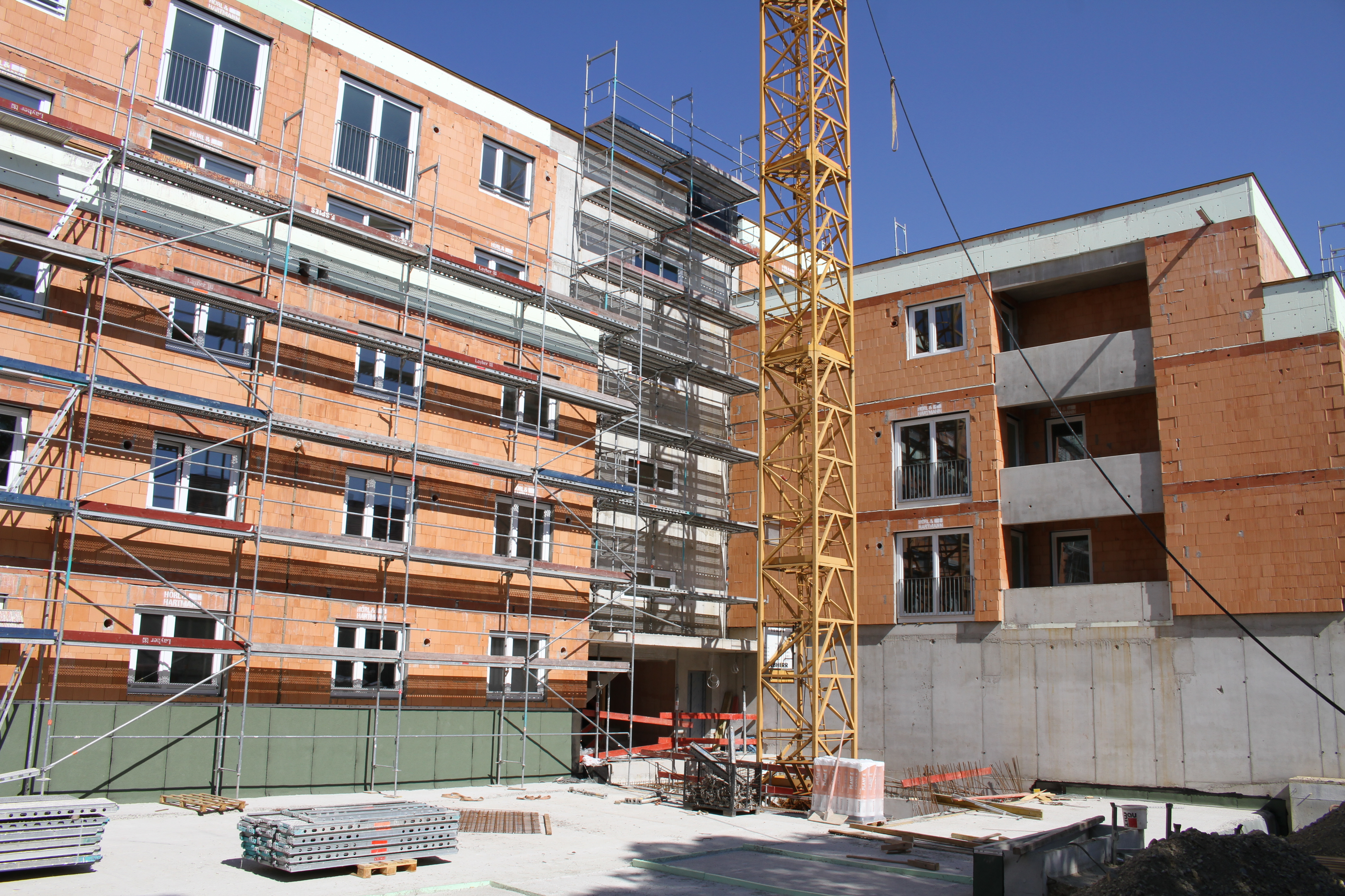 München, Sendling-Westpark. Passauerstraße, Wohnanlage der GEWOFAG im Bau.